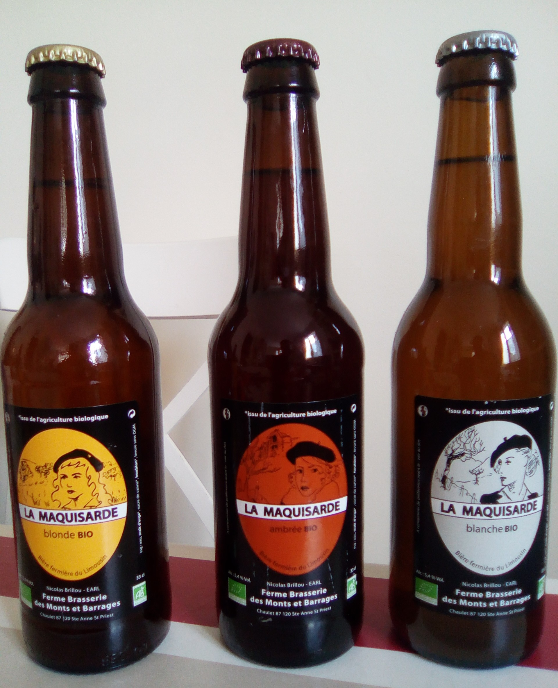 Bouteille de la bière bio La Maquisarde (blonde, ambrée et blanche)